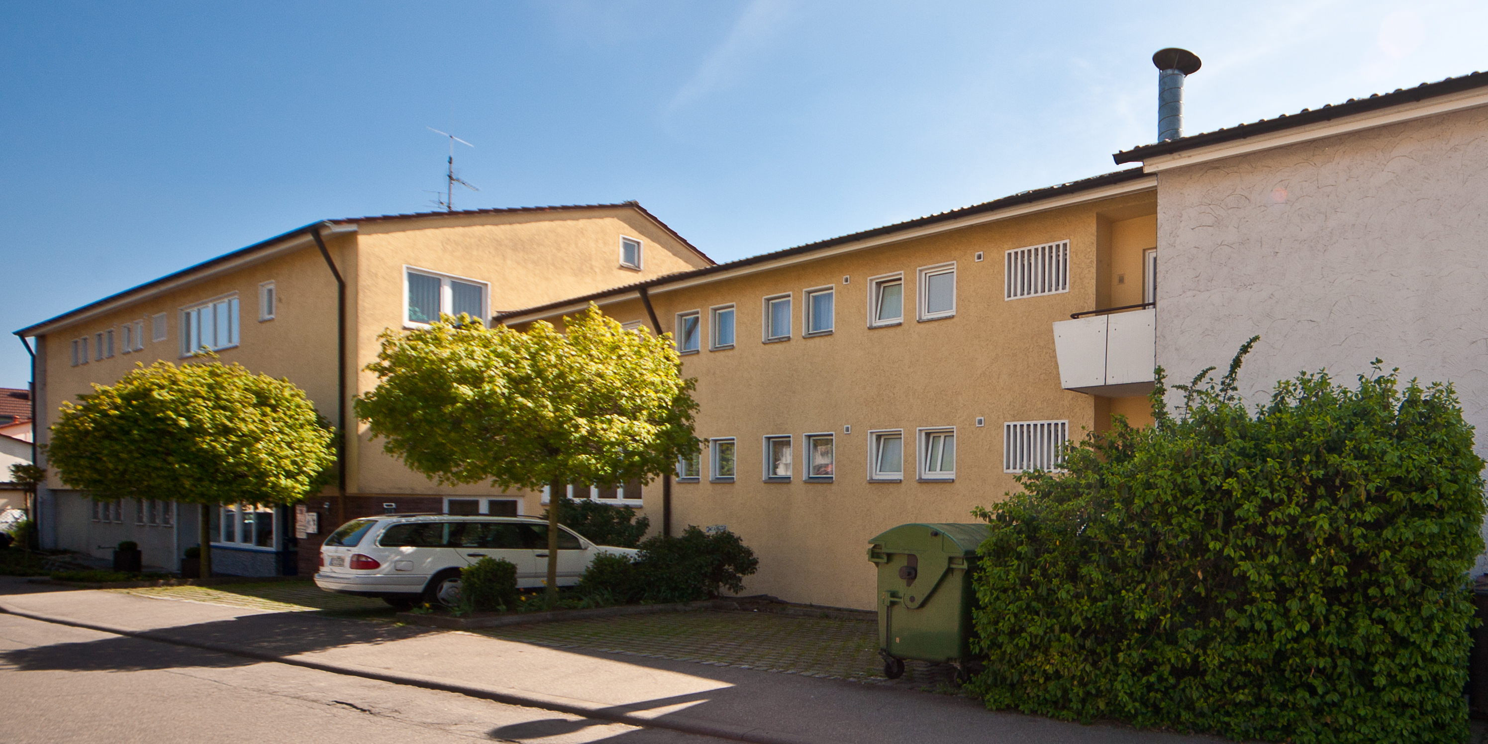 Akademie für Weltmission; Hauptgebäude; Straßenseite